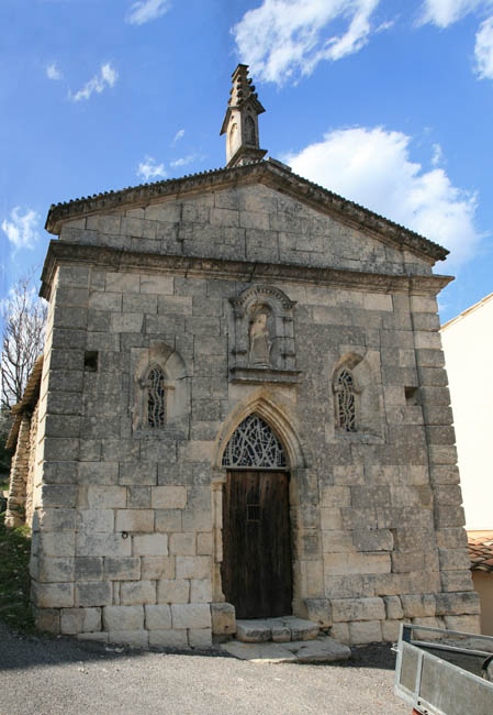 Chapel, Village of Saint Martin de Castillon in Vaucluse, France